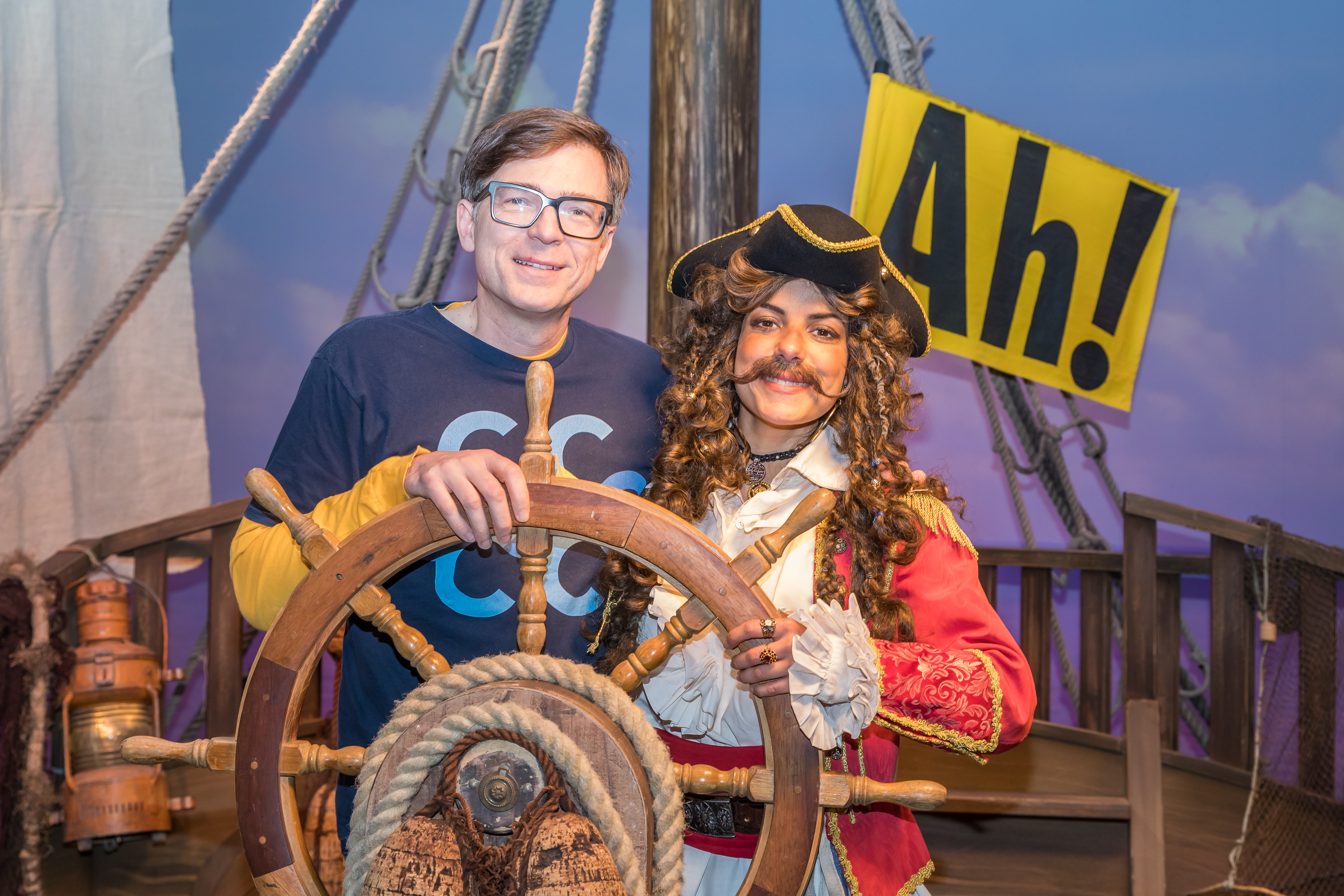 Wissen macht Ah! - Pressetermin im Studio in Köln-Bocklemünd Foto: Ralph Caspers und Clarissa Corrêa da Silva als Piratin in der Kulisse der Sendung